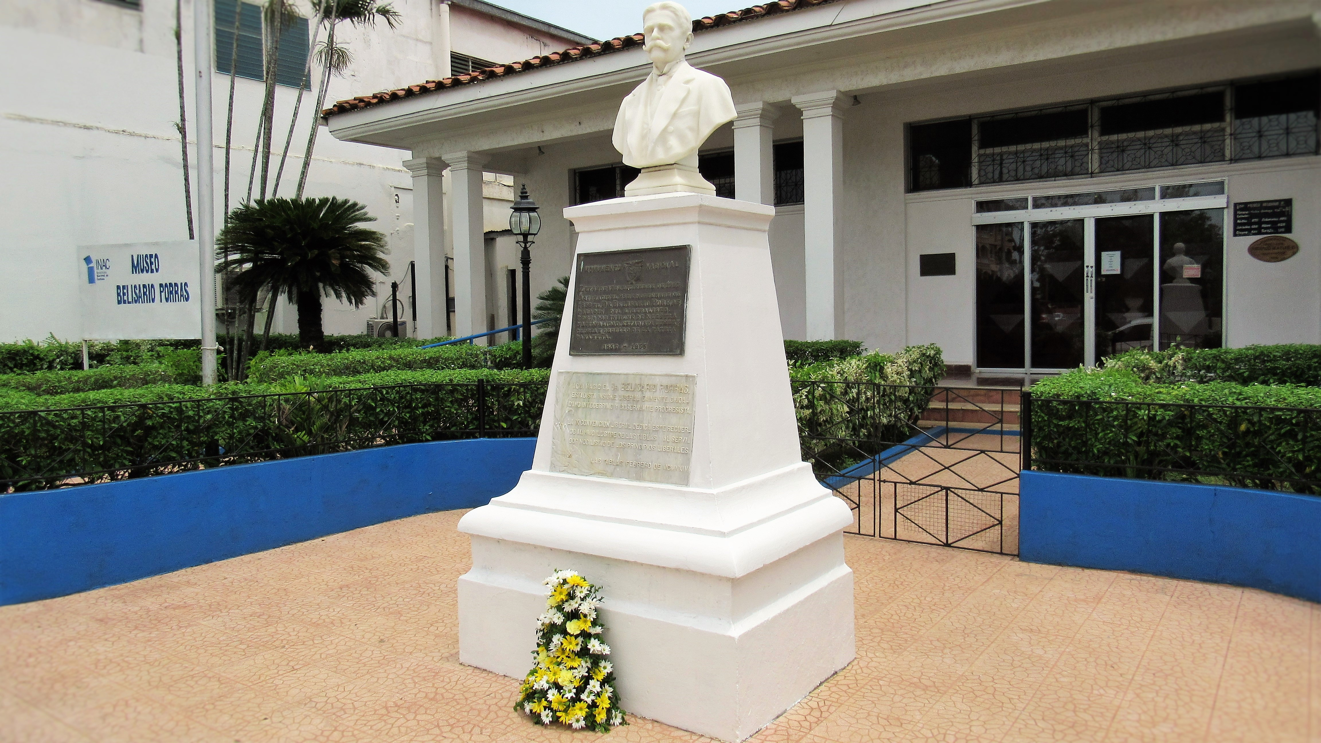 El sitio donde nació el Dr. Belisario Porras en la Ciudad de Las Tablas, República de Panamá, pasó de ser un simple solar a convertirse en un museo que exalta la persona de quien es considerado para muchos panameños el mejor Presidente de la República de Panamá.